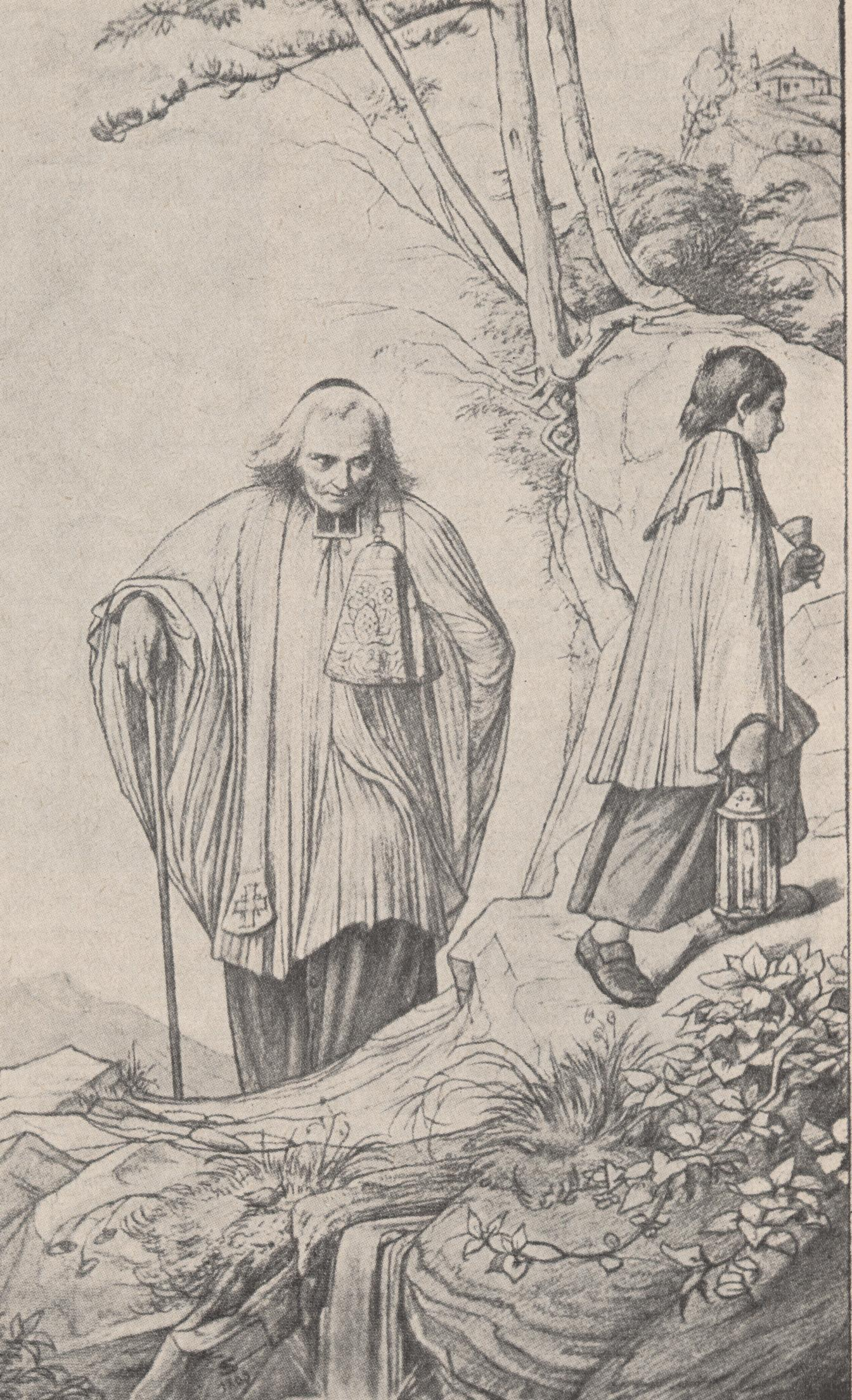 privater Druck-Abzug um 1890